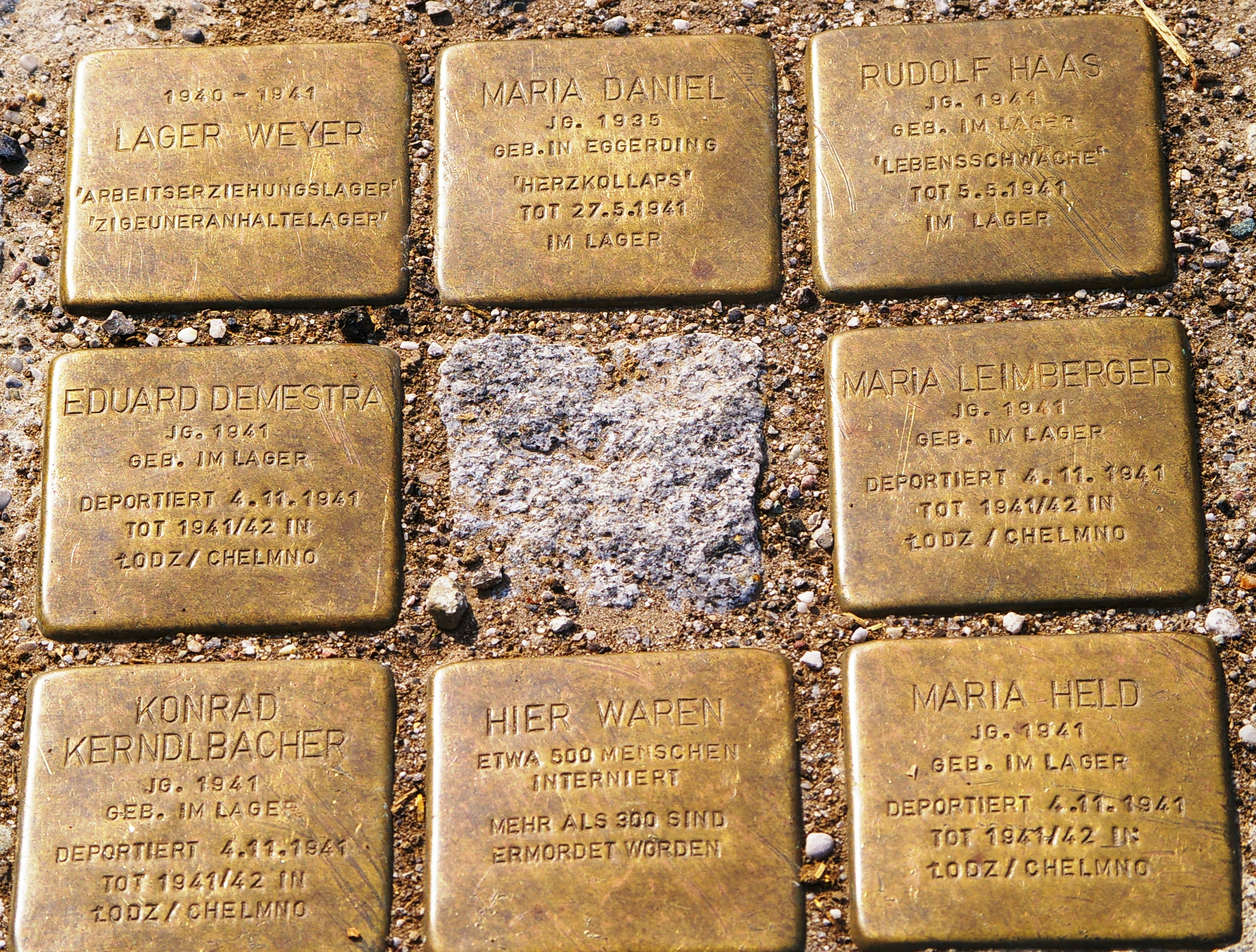 Stolpersteine in Erinnerung an das Arbeitserziehungslager Weyer und 6 darin Geborene und Internierte